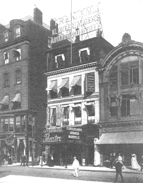 Boston, Massachusetts